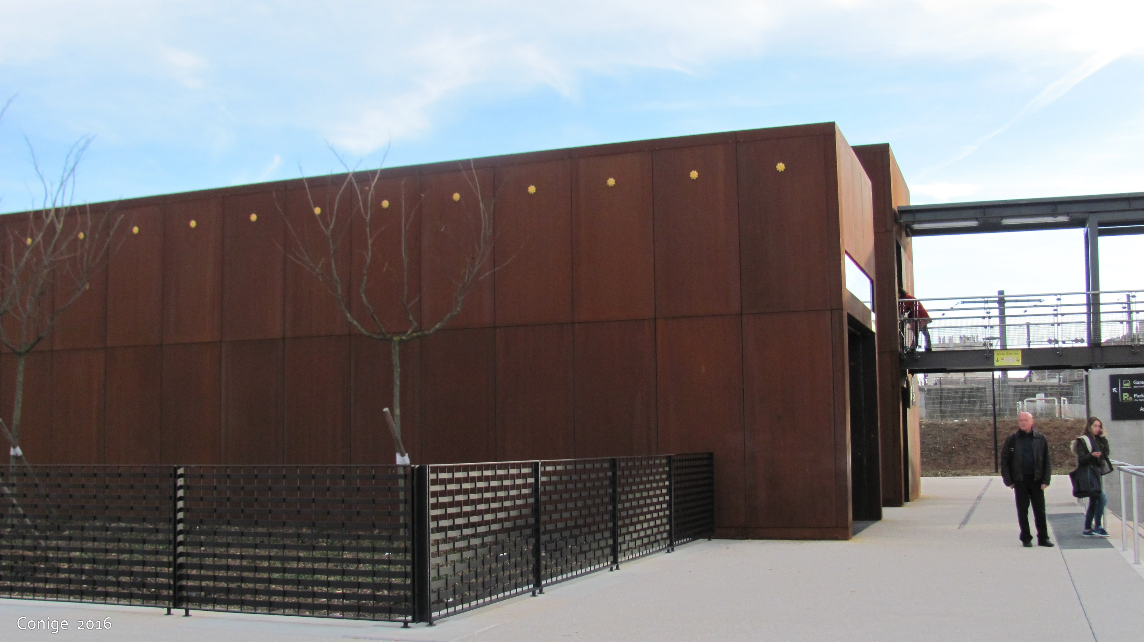 Illustration photographique d'un des accès en forme de cube fait de cuivre à la station de métro Gare d'Oullins du métro de Lyon.